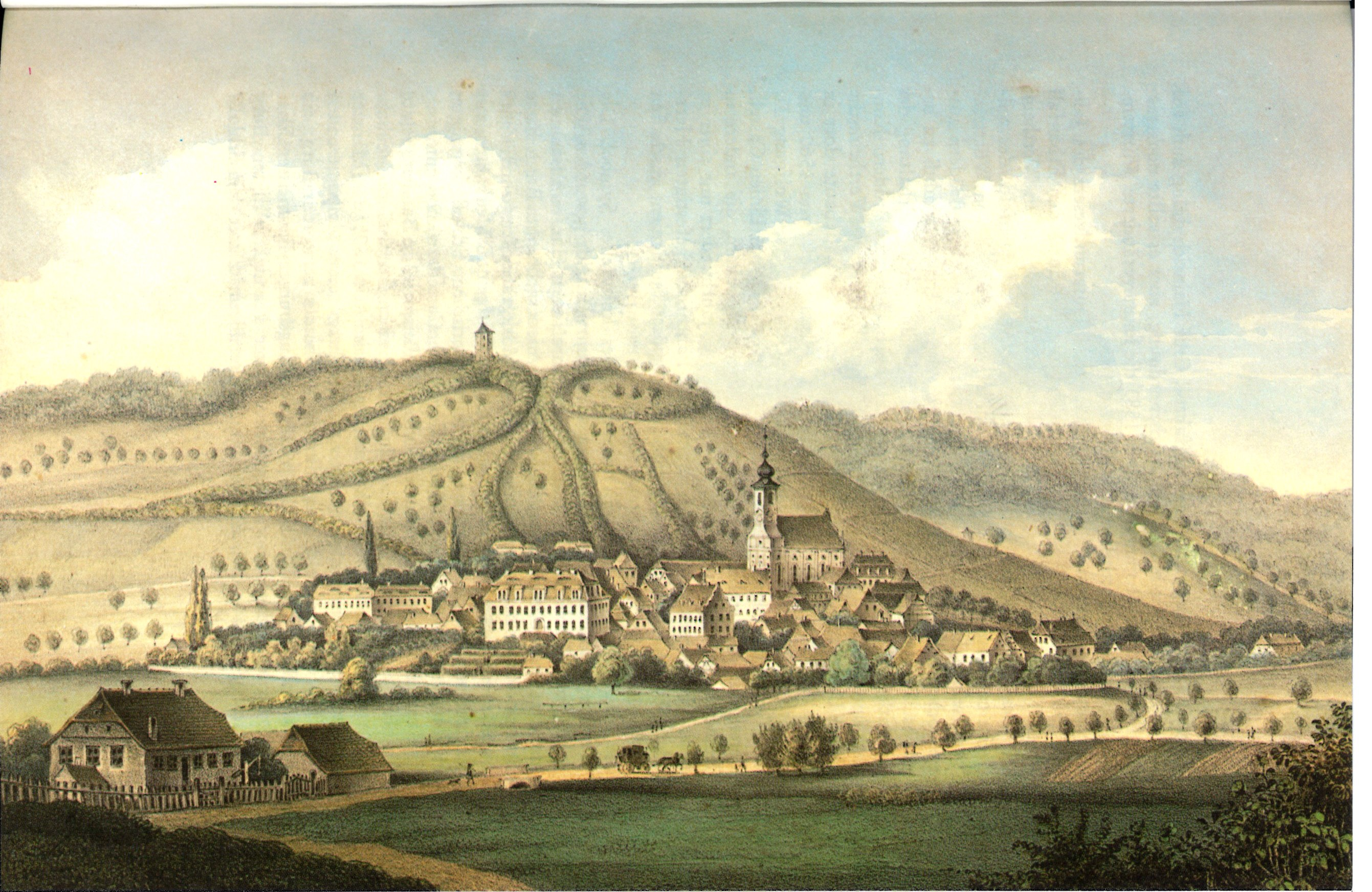 "Castell". Ansicht von Norden, nach 1837, Farblitographie